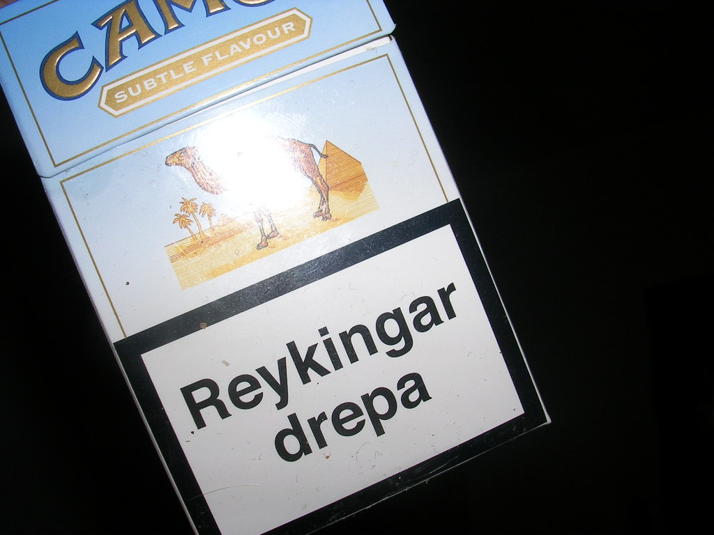 Cajetilla de Camel.